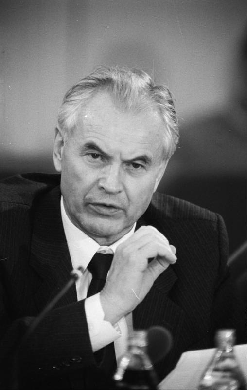 ADn-ZB/Mittelstädt/24.1.90/zei/ Berlin: Hans Modrow, Vorsitzender des Ministerrates der DDR (SED-PdS). - 1990/0124/310N